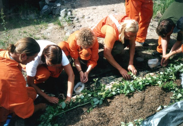 Insamling av myrägg på överlevnadsutbildning